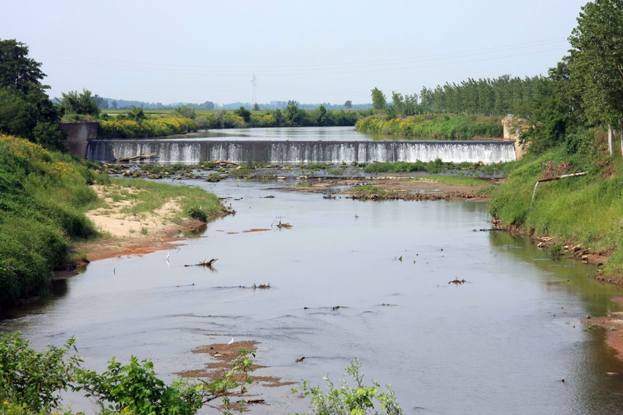 Cascata sul torrente Agogna a Nicorvo (PV)